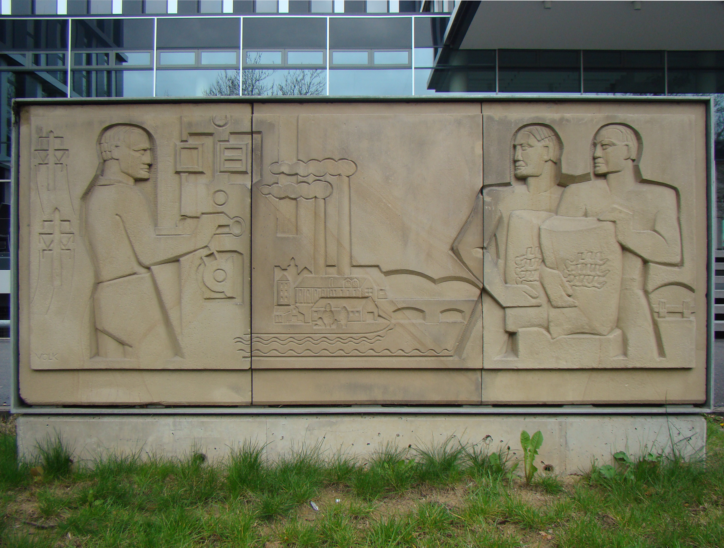 Reliefplastik von Albert Volk vor dem Firmensitz der ZEAG in der Weipertstraße 41 in Heilbronn